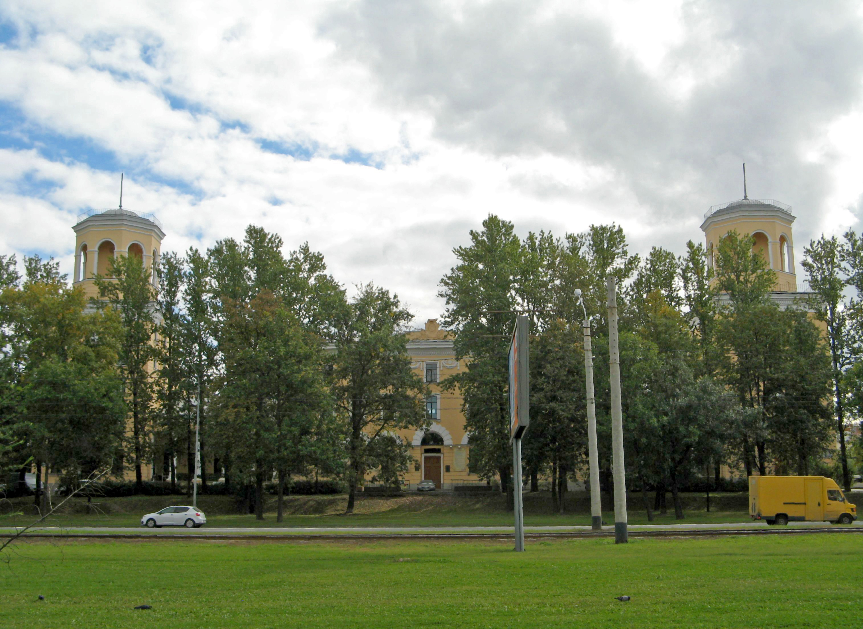 Дача К. Сиверса (современный ДК "Кировец"). Санкт-Петербург, пр. Стачек, 158.